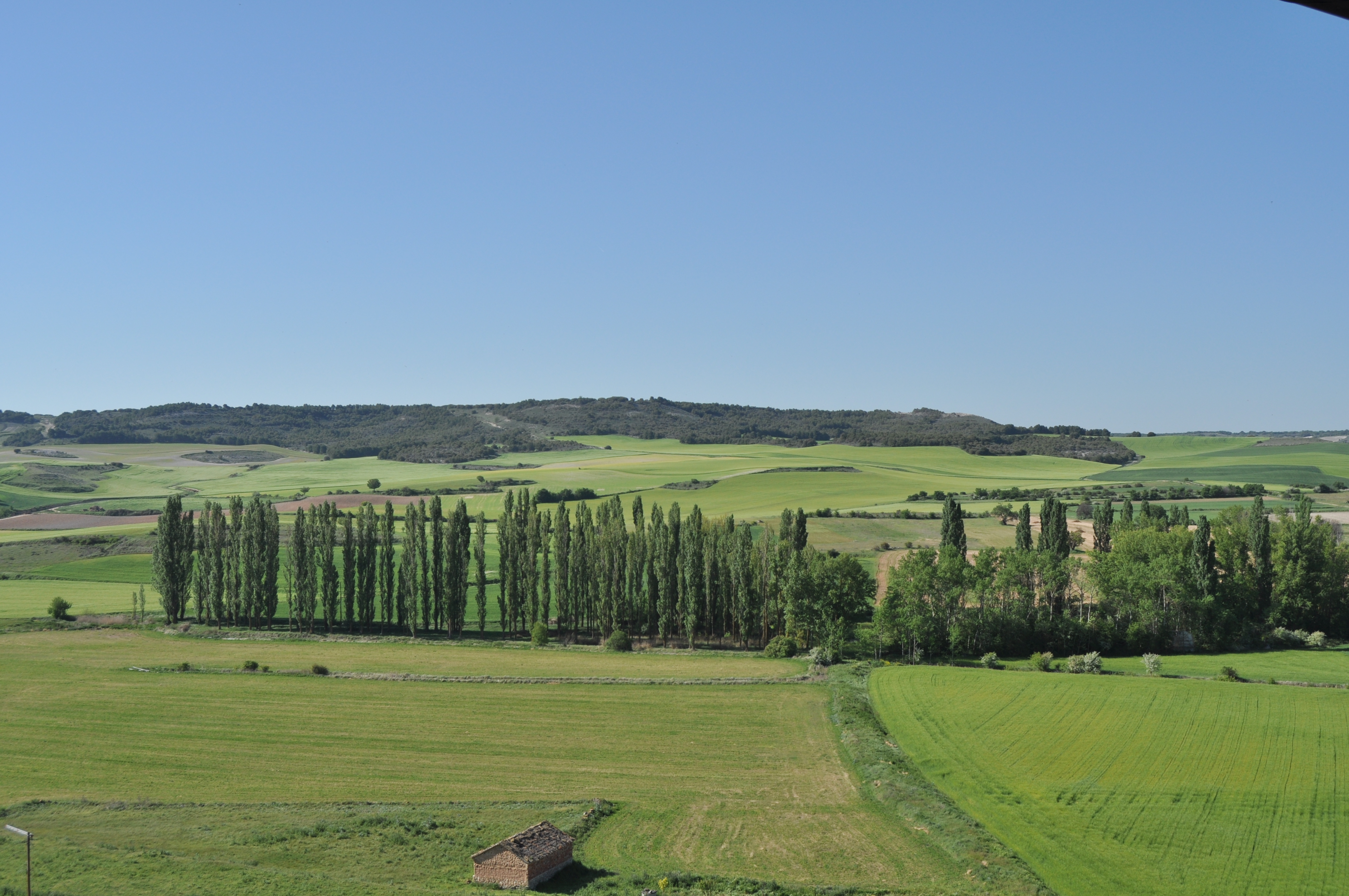 Vertavillo - 020